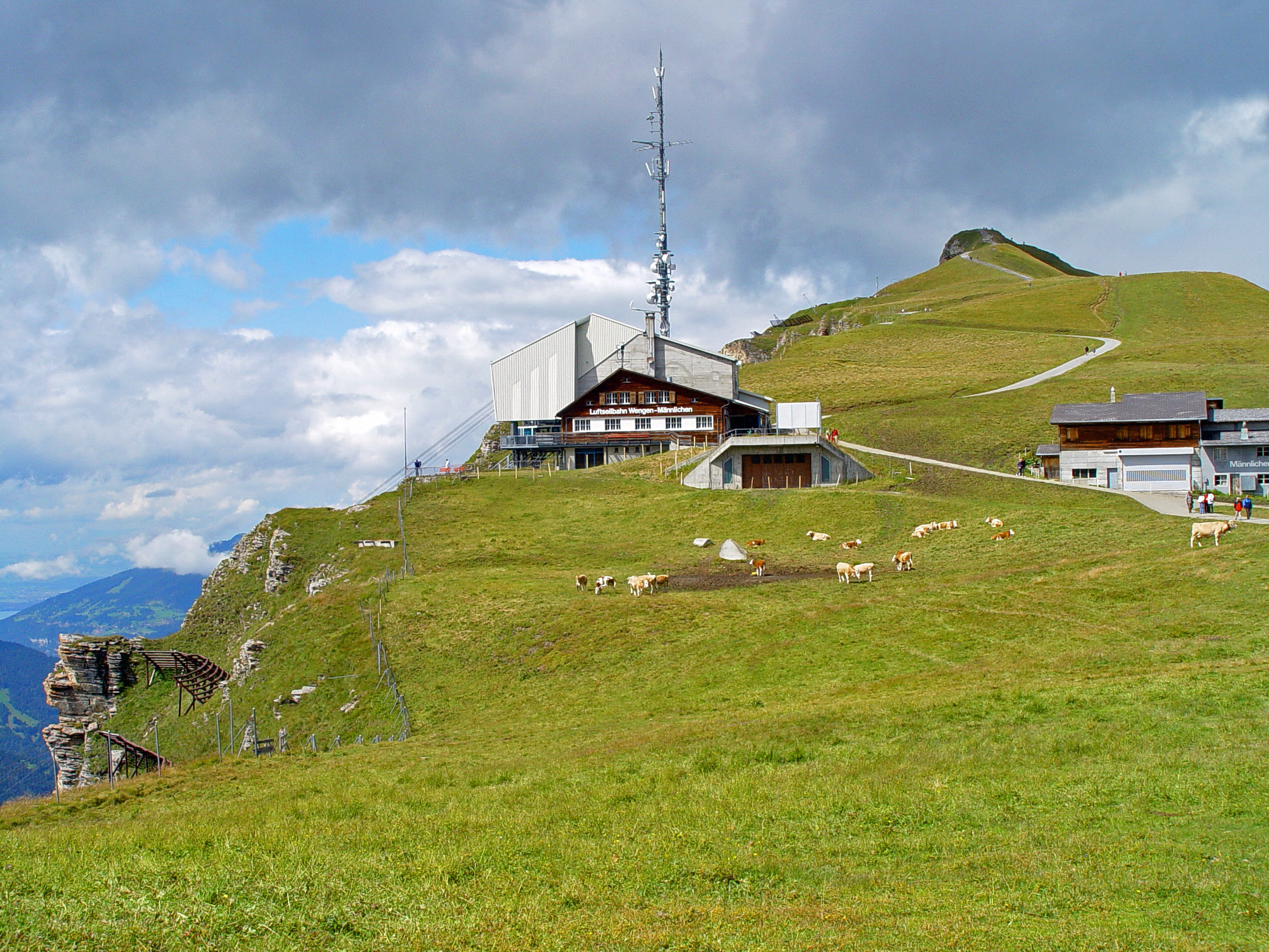 Station Männlichen im Sommer mit wenig Touristenbetrieb